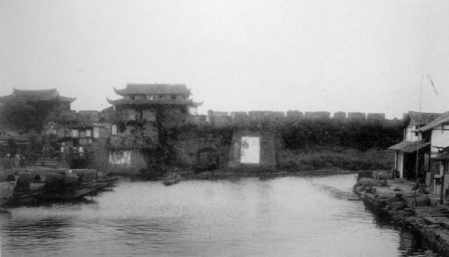 宁波旧城墙南门